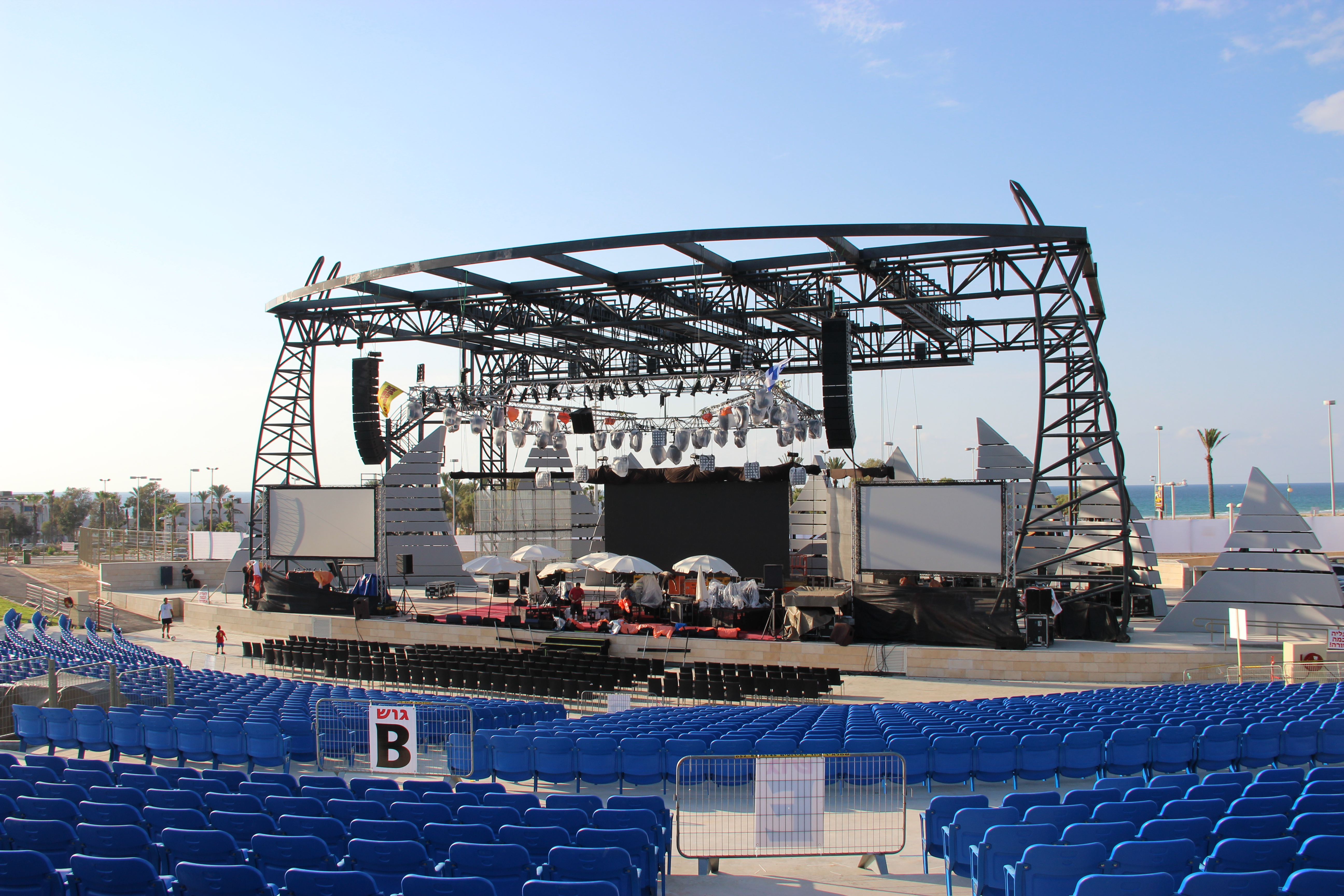 Amphitheater Ashdod, October 2012